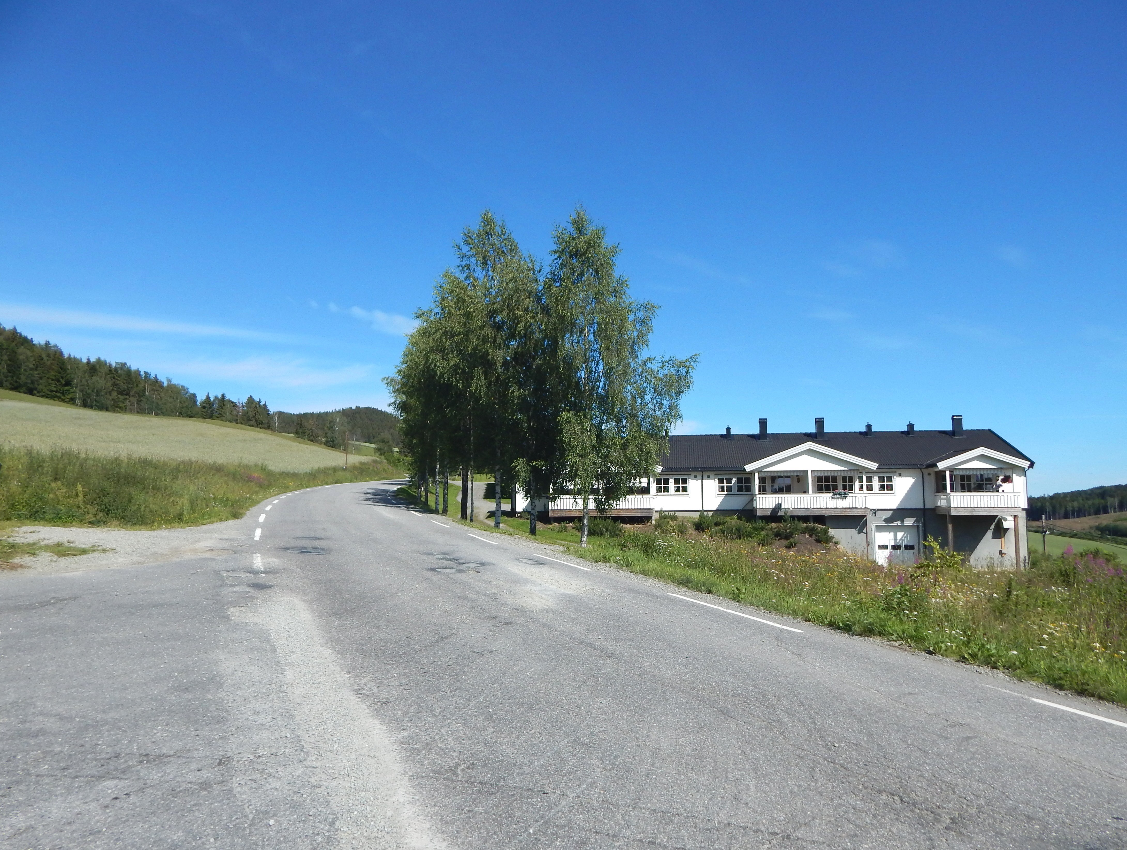 Tandeskogvegen et stykke nordøst for Tande (Ringsaker) stasjon